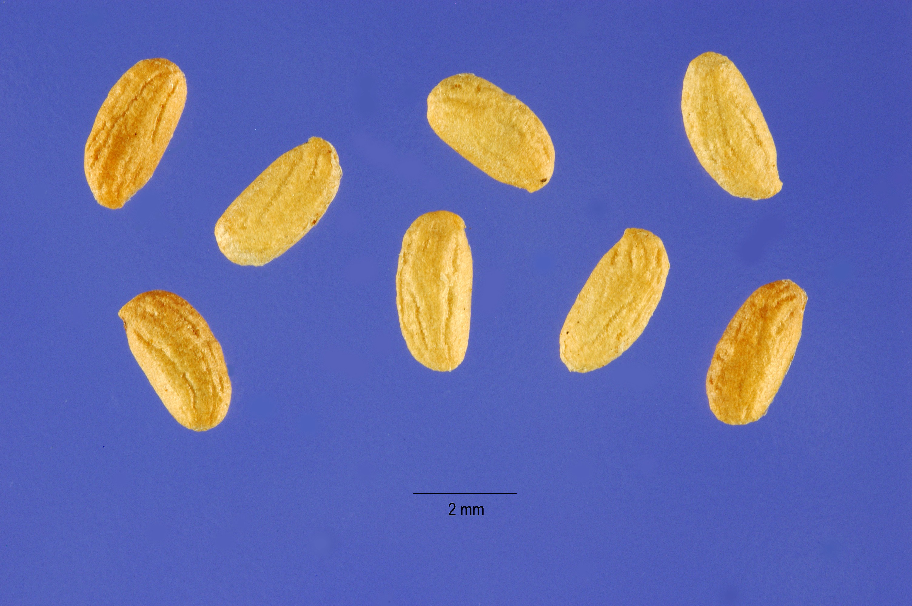 Aralia nudicaulis, Wild Sarsaparilla. Seeds.